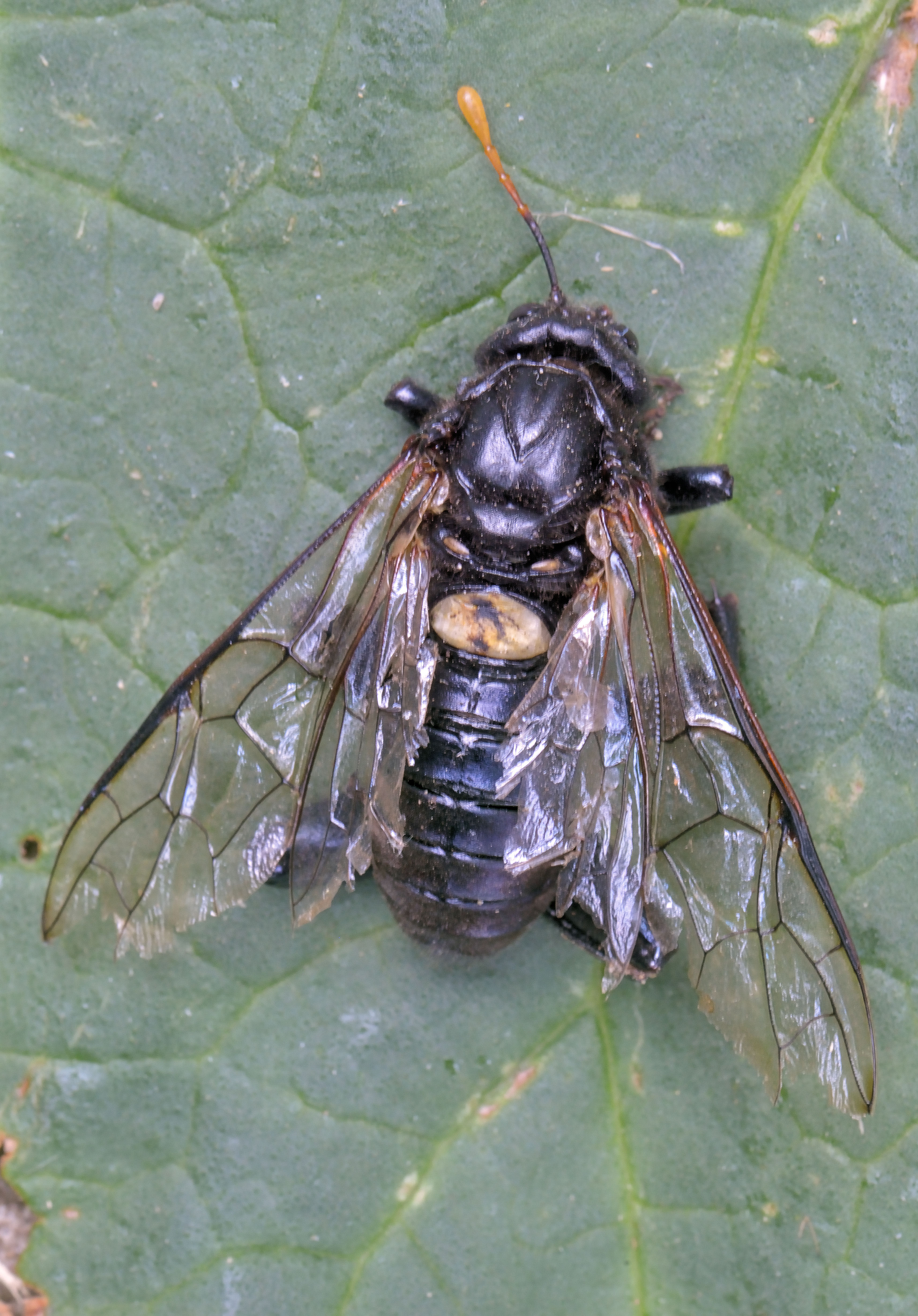 Cimbex femoratus female